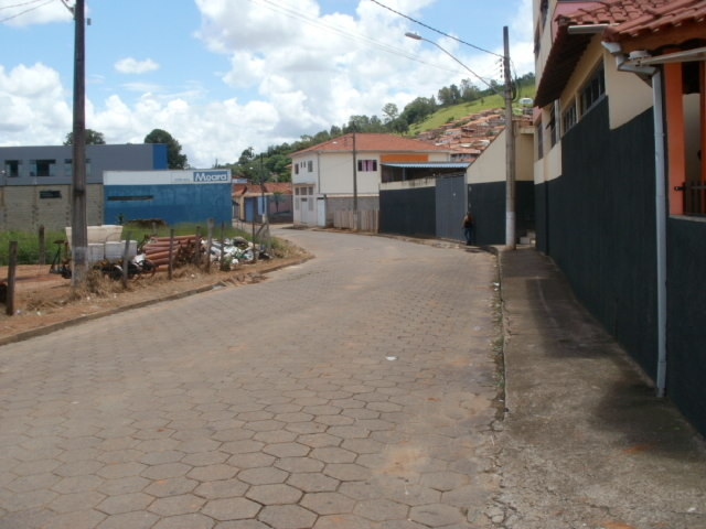 Vista de uma rua em Piranguinho, Minas Gerais, Brasil.